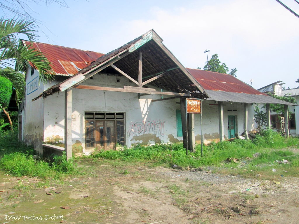 Stasiun Plumpang merupakan Stasiun KA Non Aktif yang terletak pada Jalur KA Babat Tuban. Terletak di Kecamatan Plumpang Kabupaten Tuban Jawa Timur